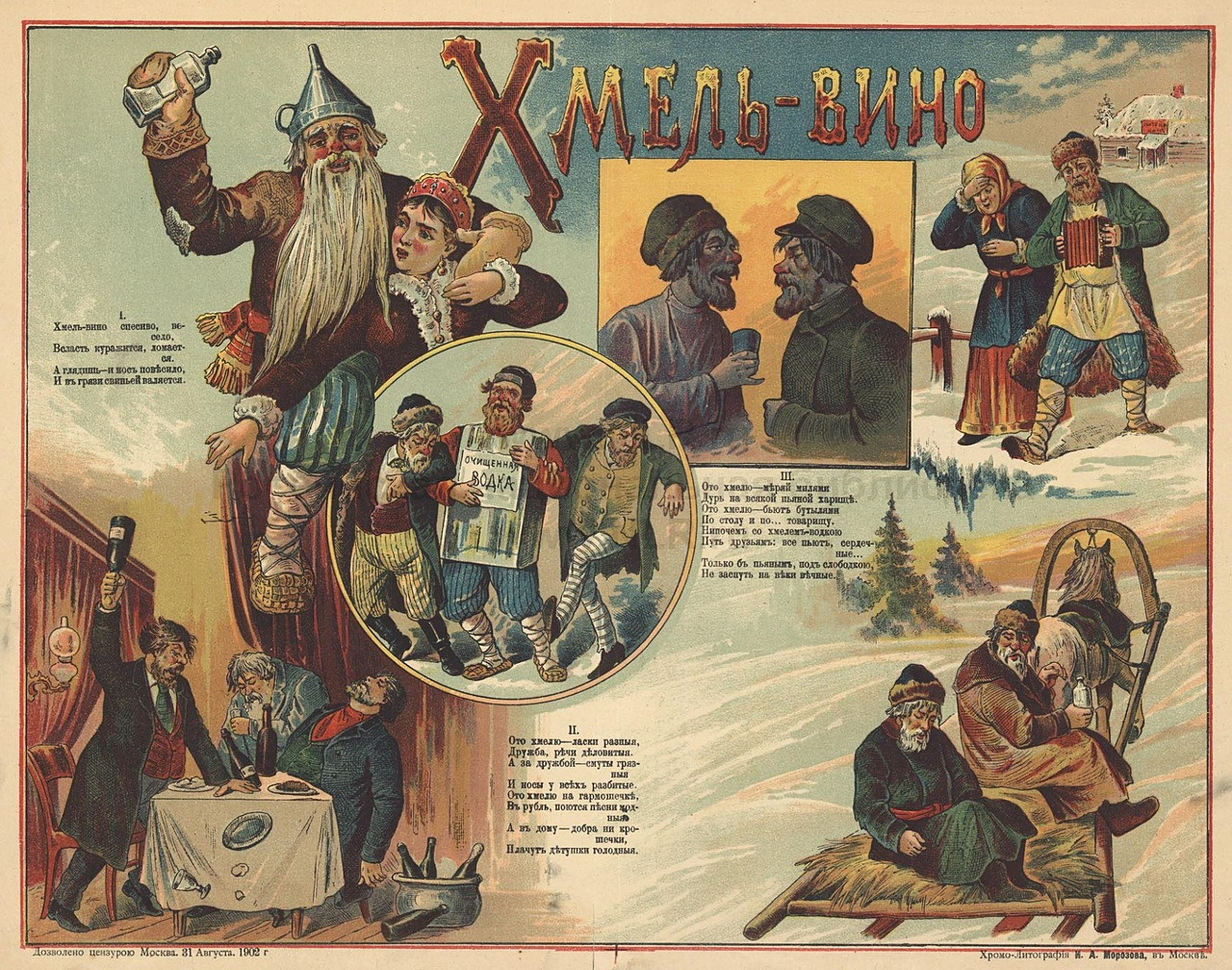 Плакат против пьянства в Российской империи.